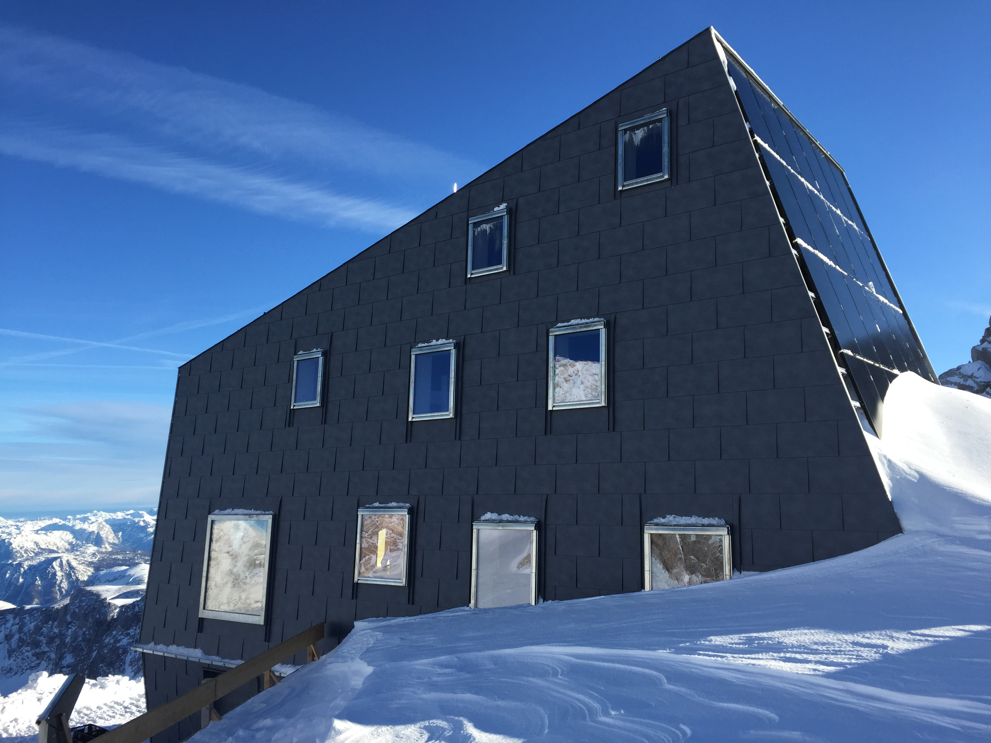 STH Außenansicht_(c) Nicole Ruprecht